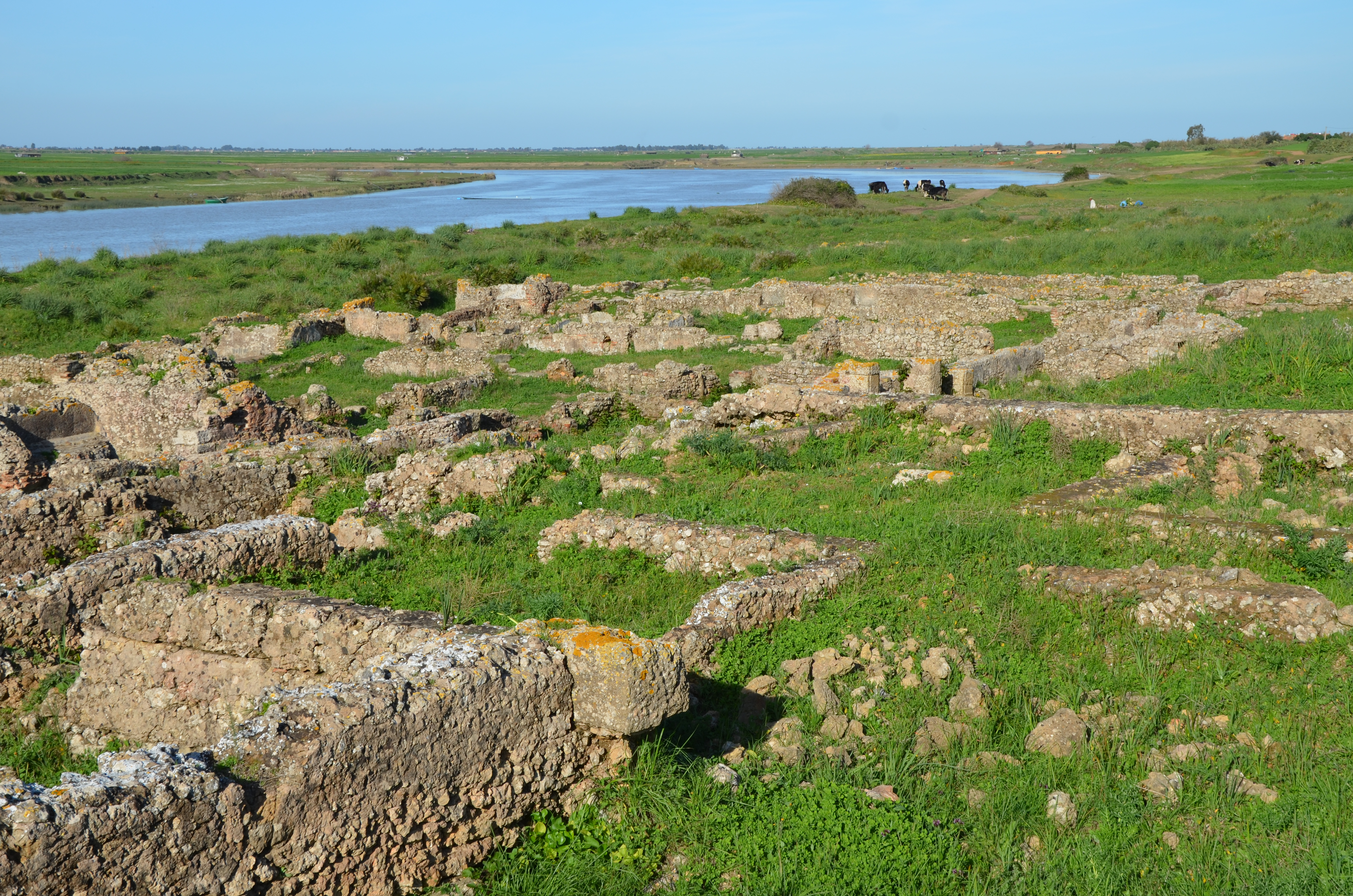 Thamusida, Mauretania Tingitana, Morocco